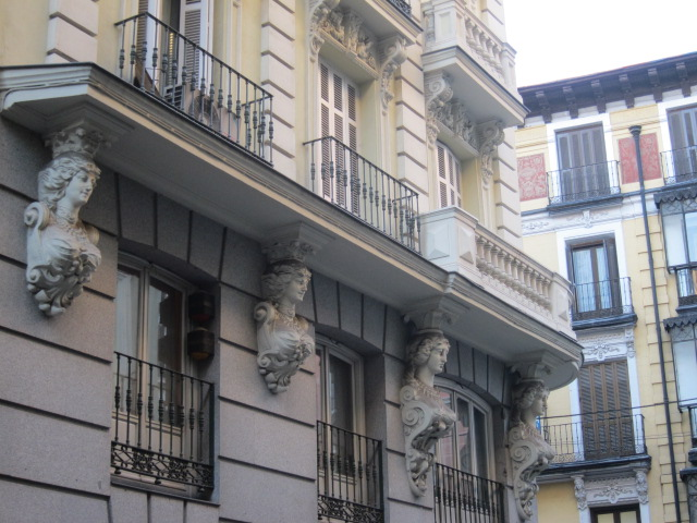 Cariátides sosteniendo una balconada en la calle de las Hileras de Madrid